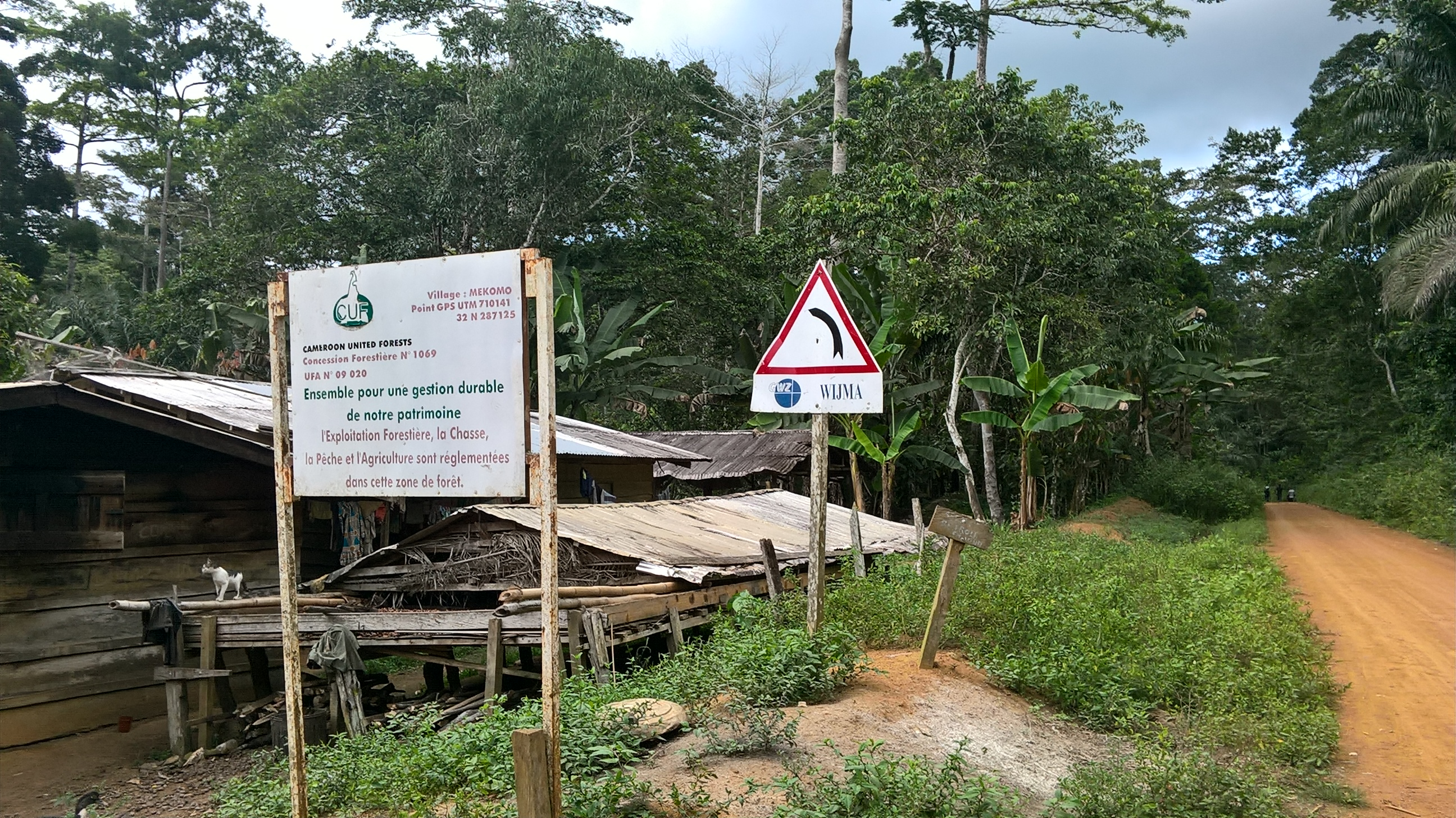 Une piste qui contraste avec la richesse forestière que regorge cette partie de la forêt équatoriale camerounaise.